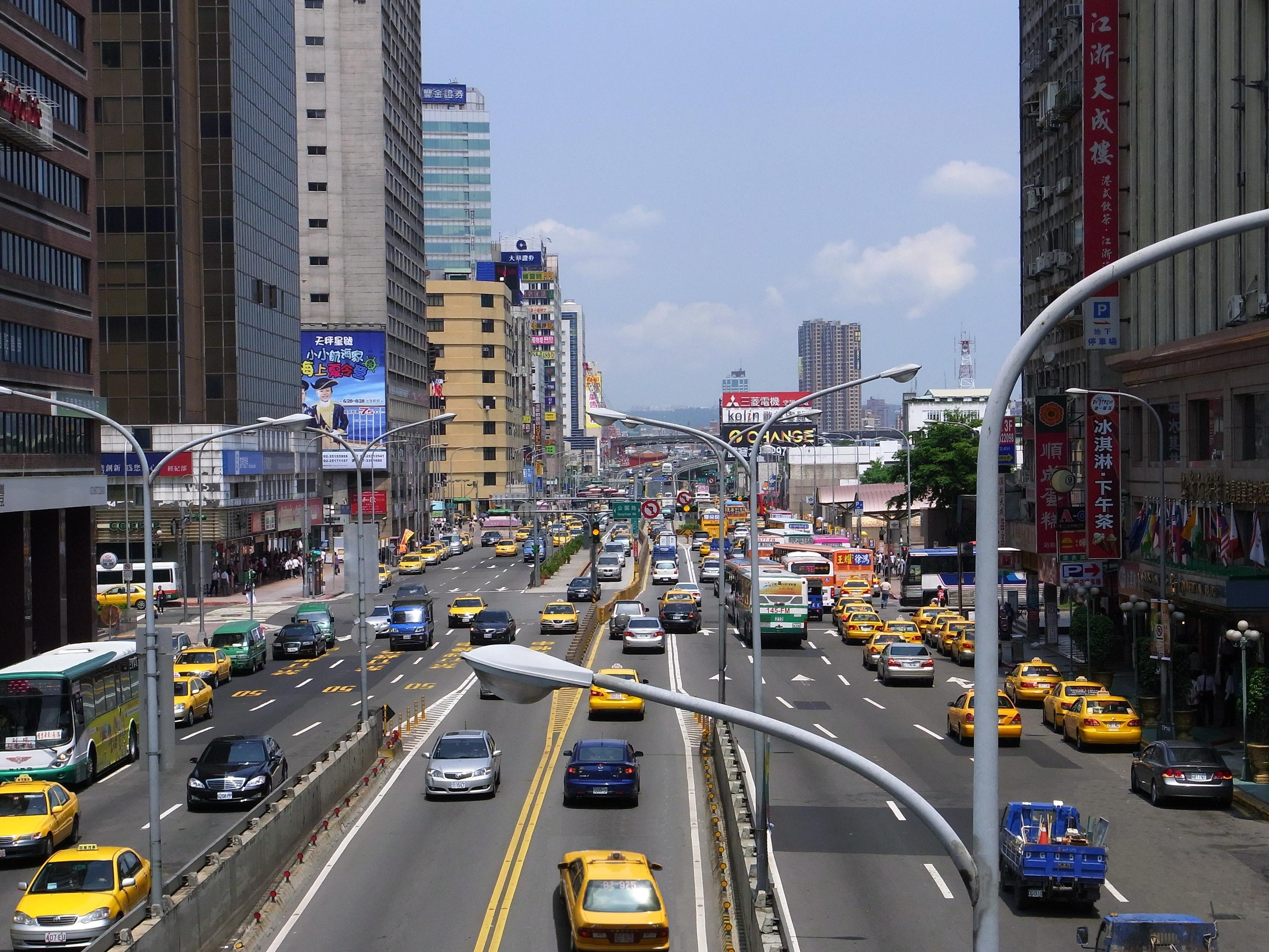 中文（台灣）: 台北市忠孝西路。